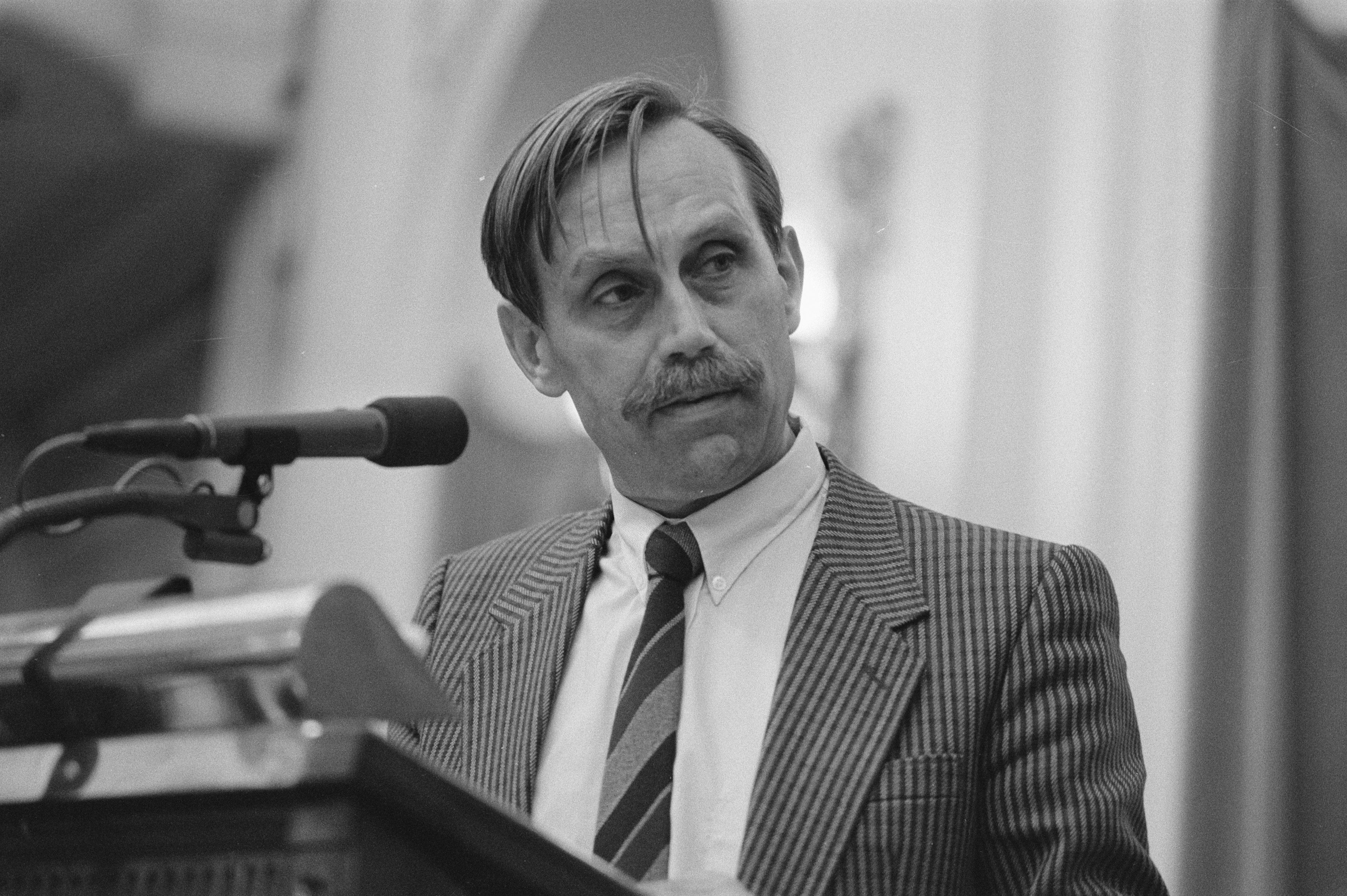 Collectie / Archief : Fotocollectie Anefo Reportage / Serie : [ onbekend ] Beschrijving : Tweede Kamer : debat kernongeval Tsjernobyl; K. Zijlstra woordvoerder kerncentrales PvdA Datum : 7 mei 1986 Trefwoorden : Debatten Persoonsnaam : K. Zijlstra Instellingsnaam : PvdA, Tweede Kamer Fotograaf : Bogaerts, Rob / Anefo Auteursrechthebbende : Nationaal Archief Materiaalsoort : Negatief (zwart/wit) Nummer archiefinventaris : bekijk toegang 2.24.01.05 Bestanddeelnummer : 933-6500